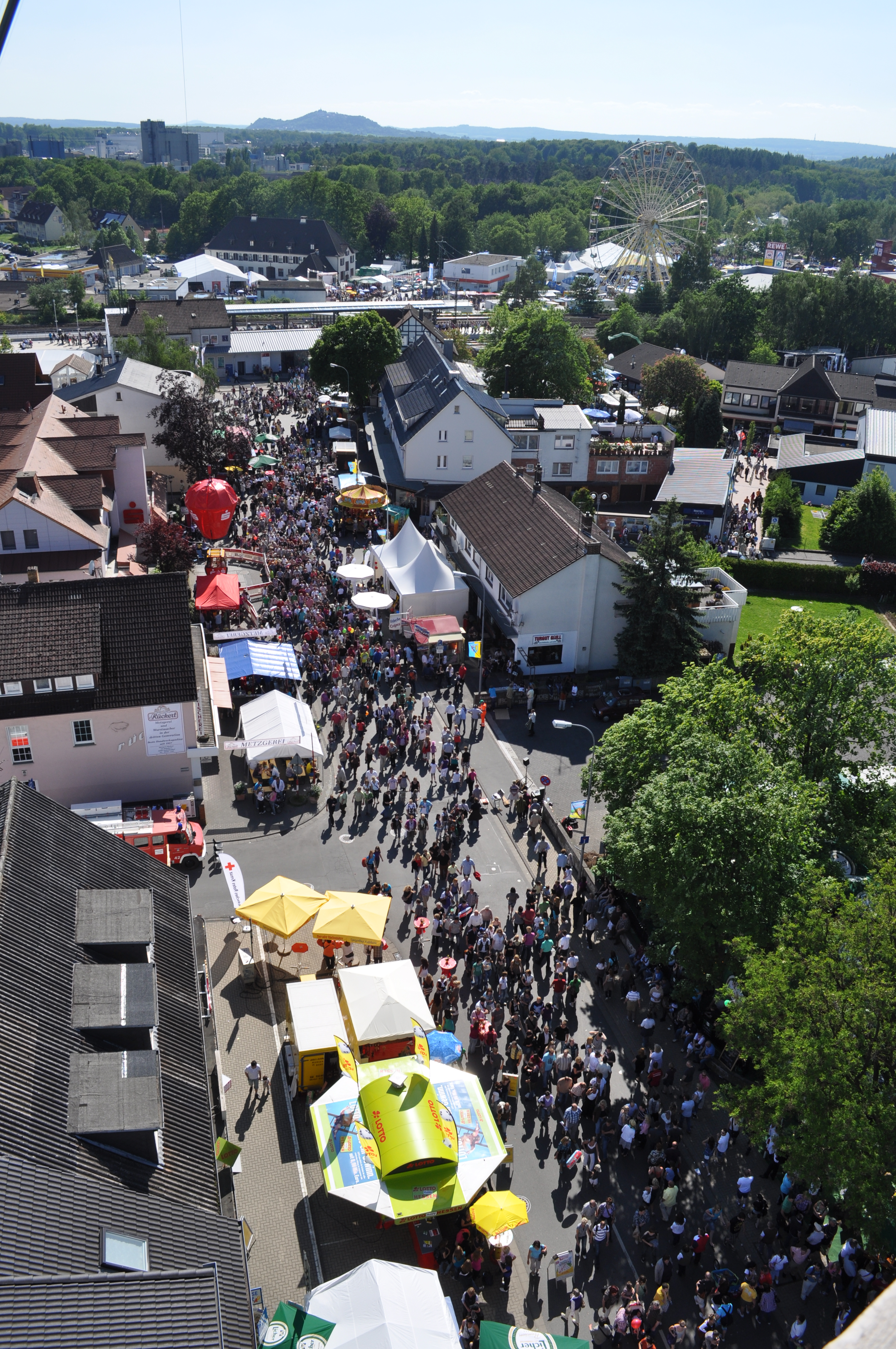 Hessentag 2010 in Stadtallendorf. Das Bild zeigt den Blick vom Turm der Stadtkirche auf die Straße "am Bahnhof", den Bahnhof und das Festgelände am Heinz-Lang Park